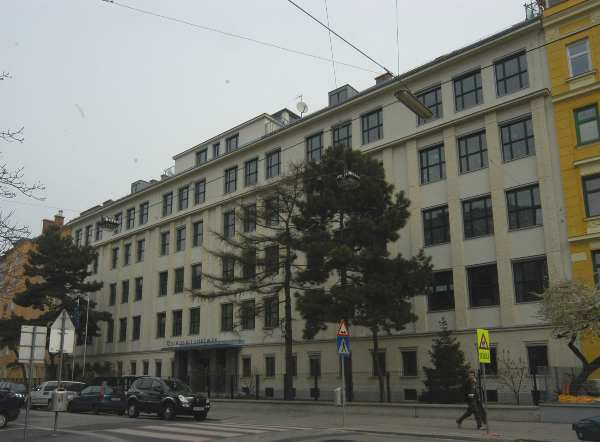 Schulgebäude Wien 20, Vorgartenstrasse 95 - 97